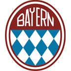 Logo Bayernu w latach 1965-1970